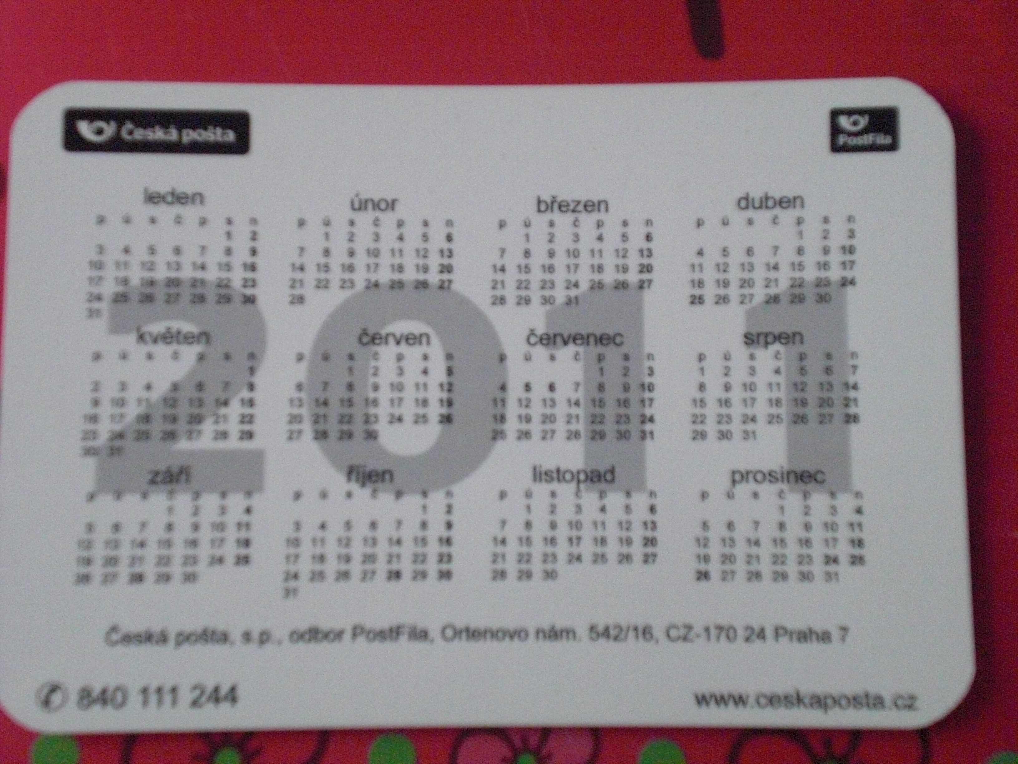 Ĉeĥa poŝkalendaro en 2011